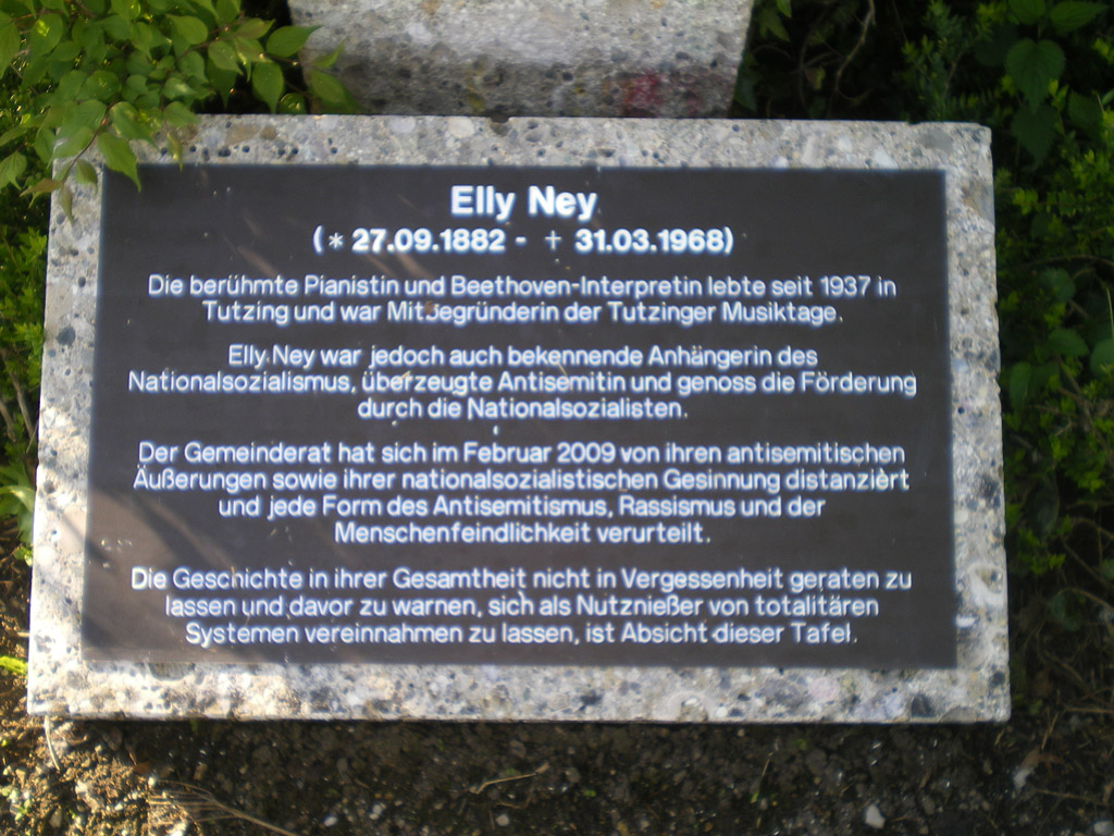 Beschriftungstafel 2010 am Elly-Ney-Denkmal in Tutzing